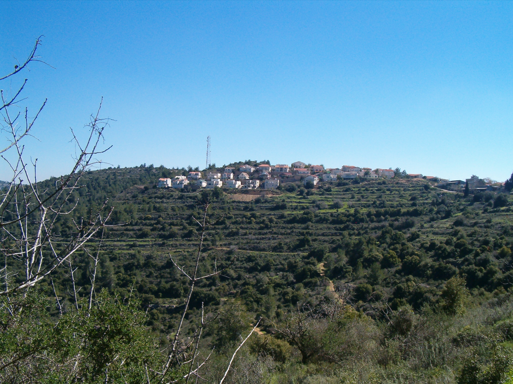 היישוב